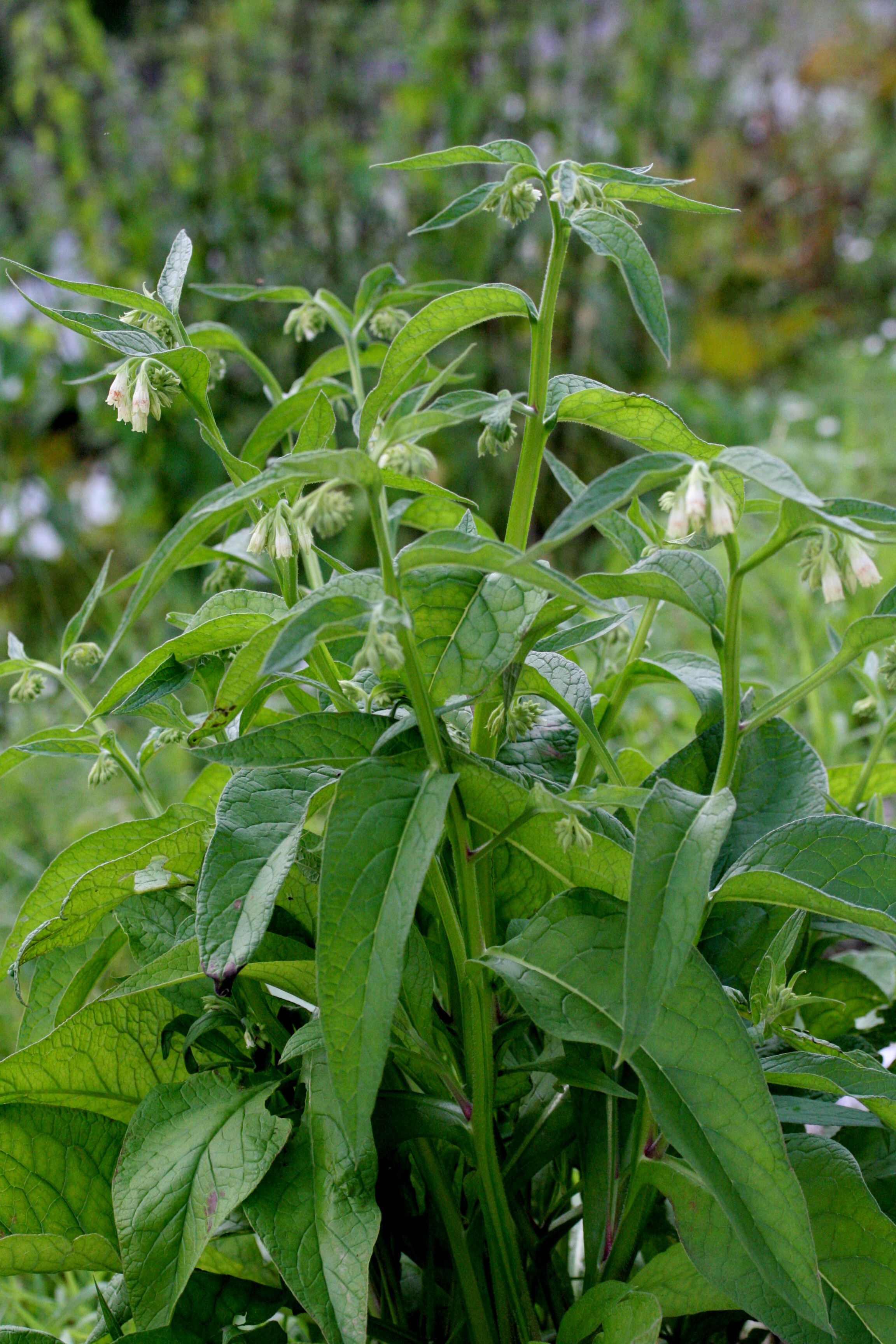 Symphytum_officinale (Consolida maggiore) Località Cortina (BL), 1400 m s.l.m.